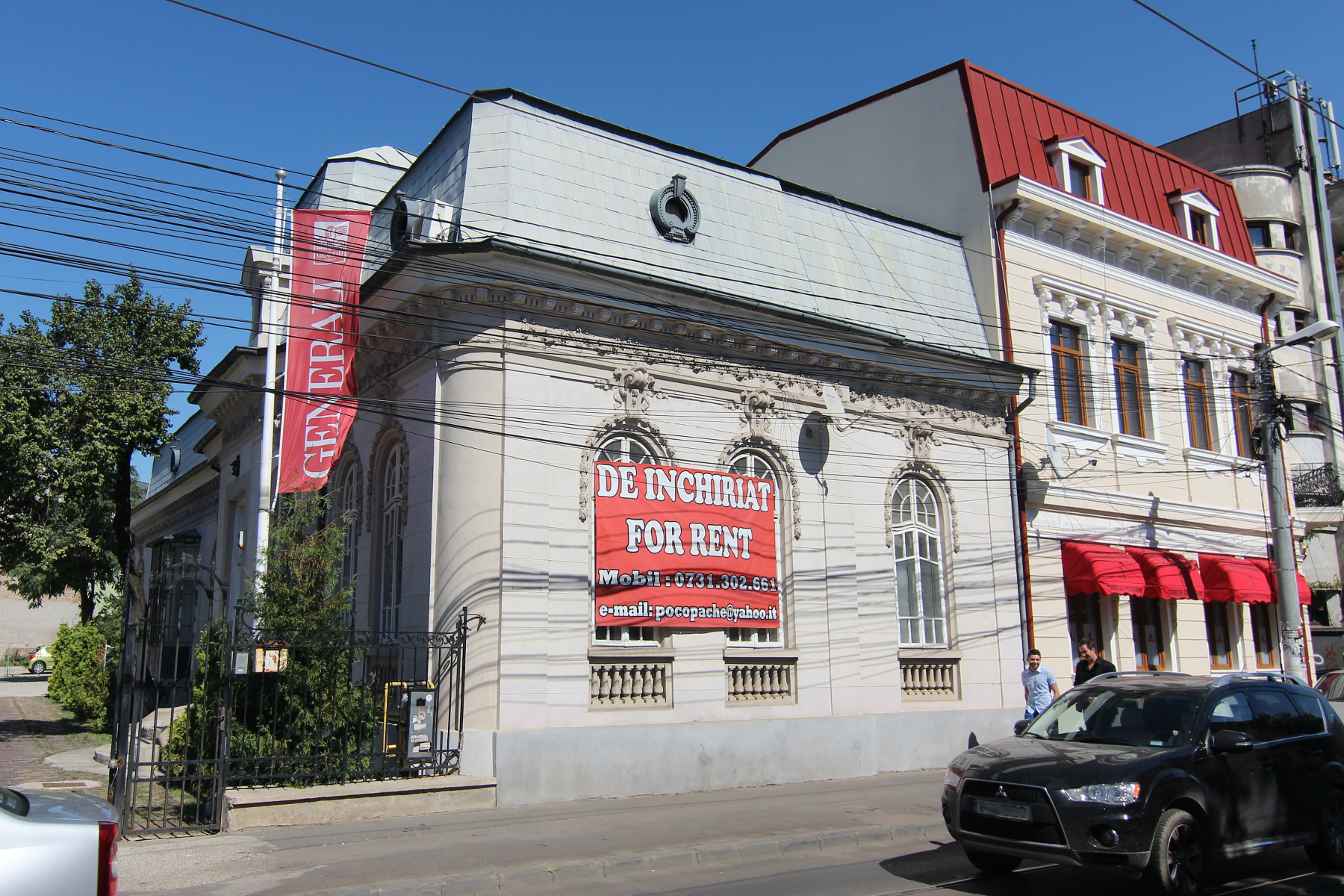 Casă pe Calea Călărașilor